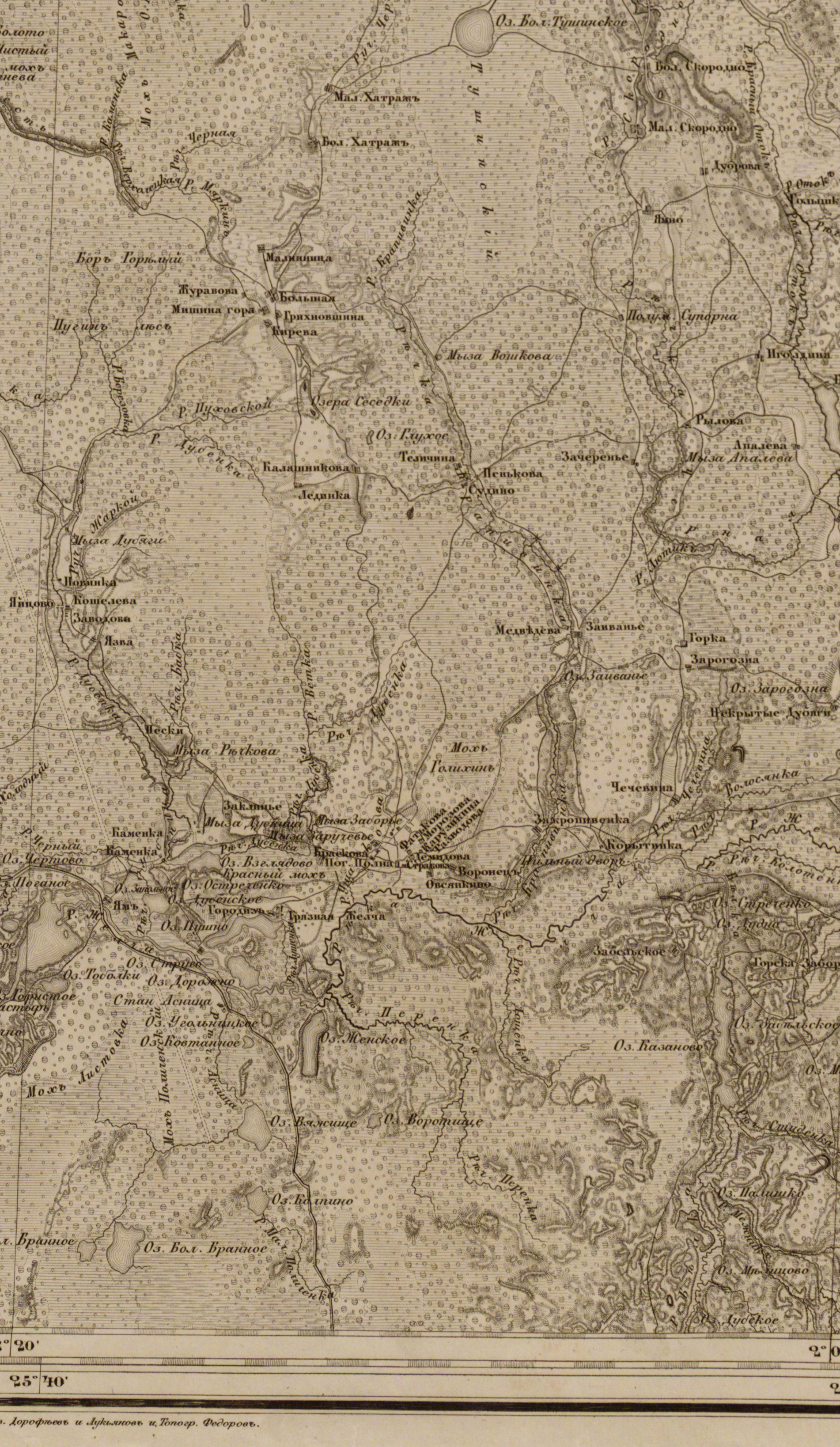 Часть трехверстовой военно-топографической карты.